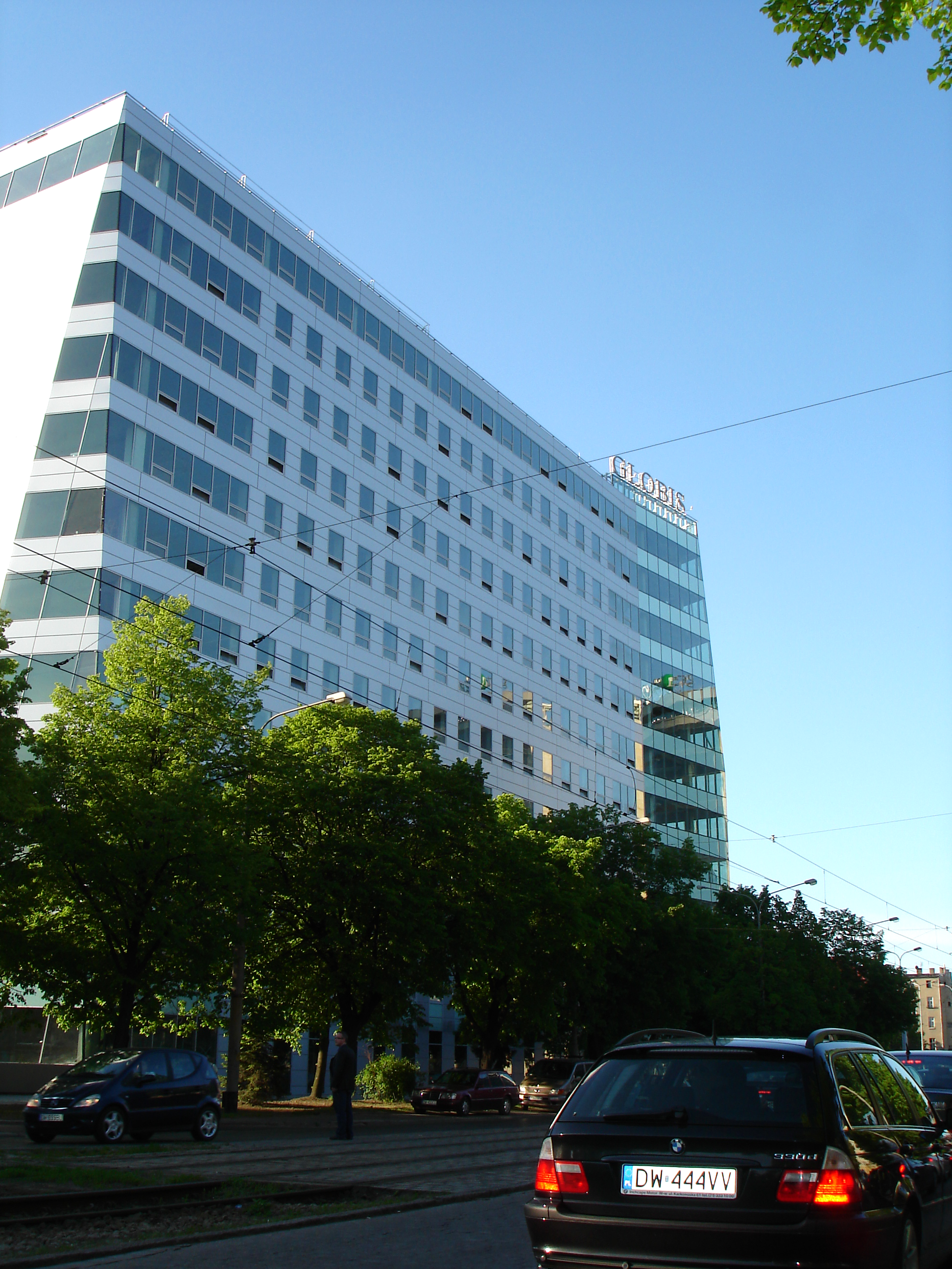 Polen: Globis Wrocław Office Centre – Modernes Bürogebäude in Breslau